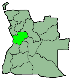 A map from province Cuanza Sul, Angola